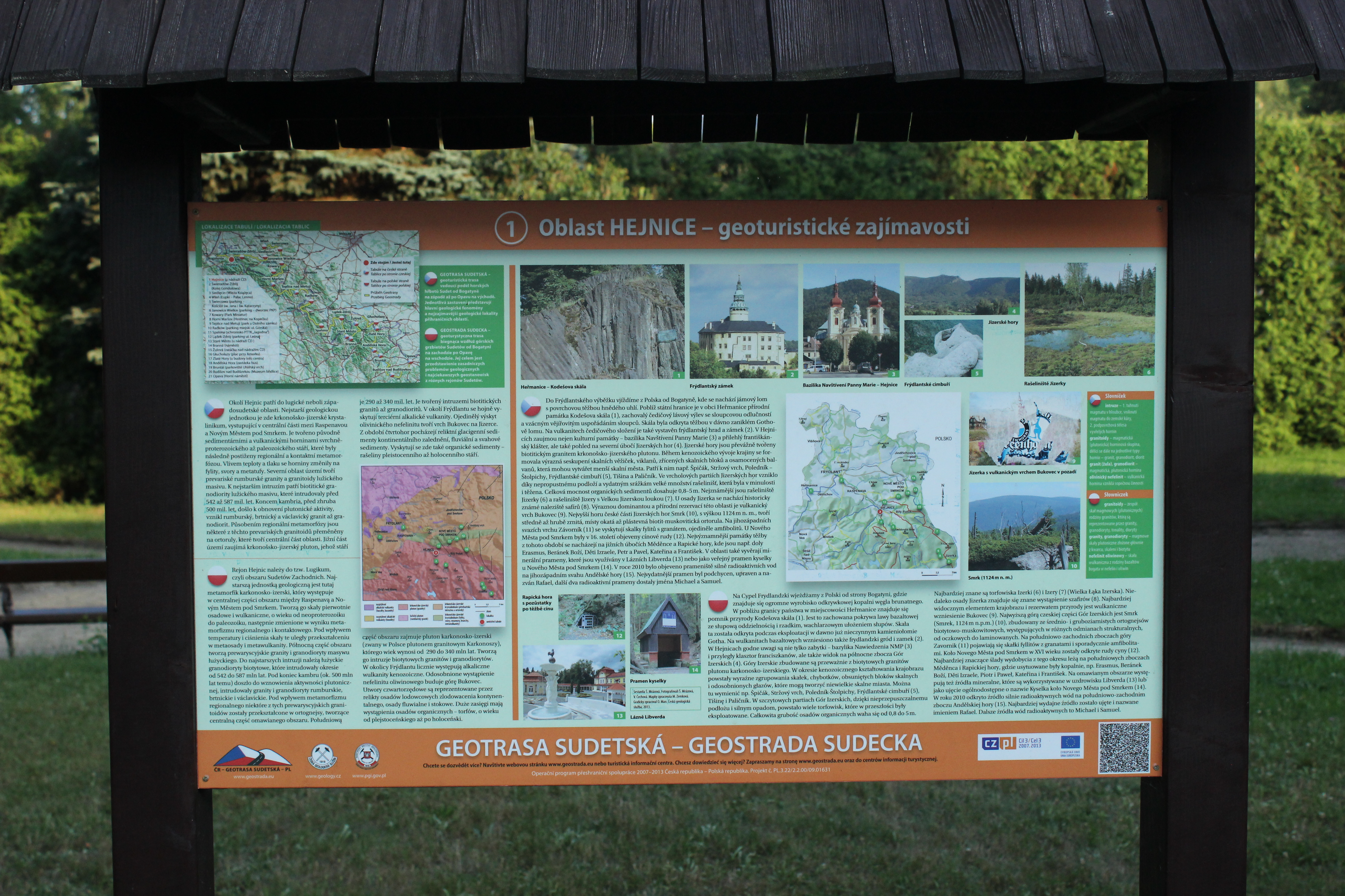 Informační tabule geoturistických zajímavostí v Hejnicích.